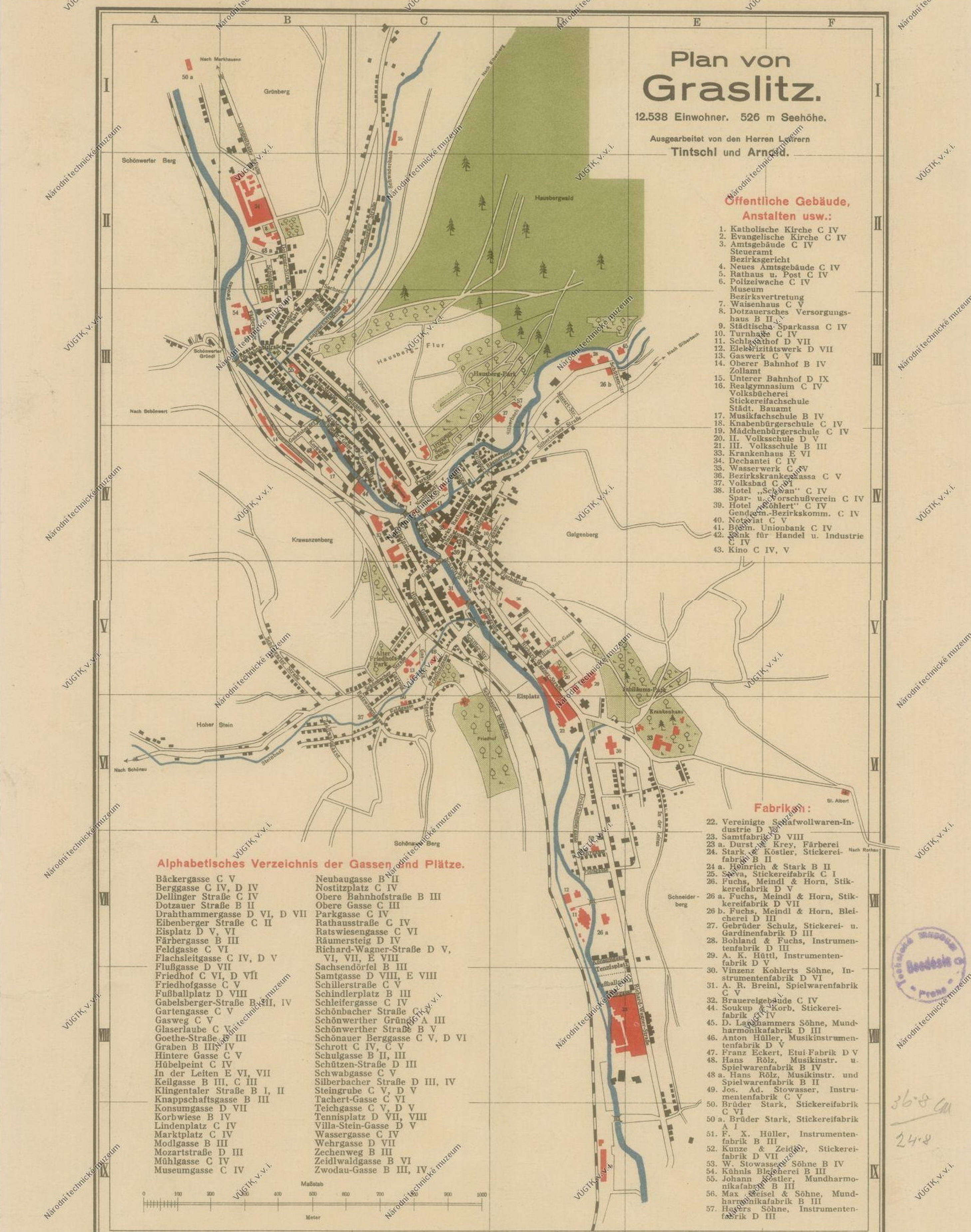 Stadtplan von 1924 von Graslitz (heute Kraslice, Tschechische Republik). Unterster Streifen Verlag: Werner Tirichter, Buchhandlung, Graslitz Nachdruck verboten 1924 abgeschnitten.